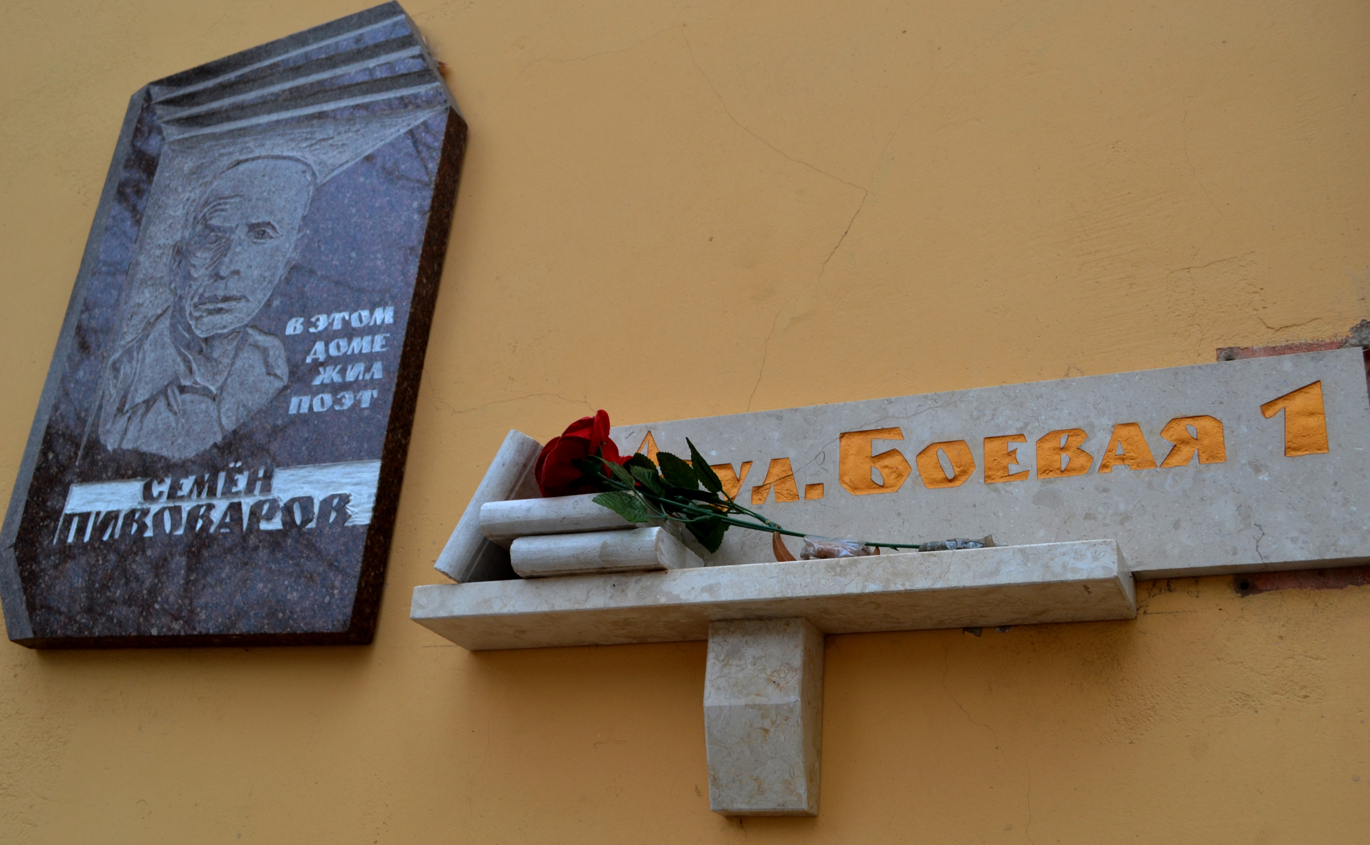 Мемориальная доска Пивоварову